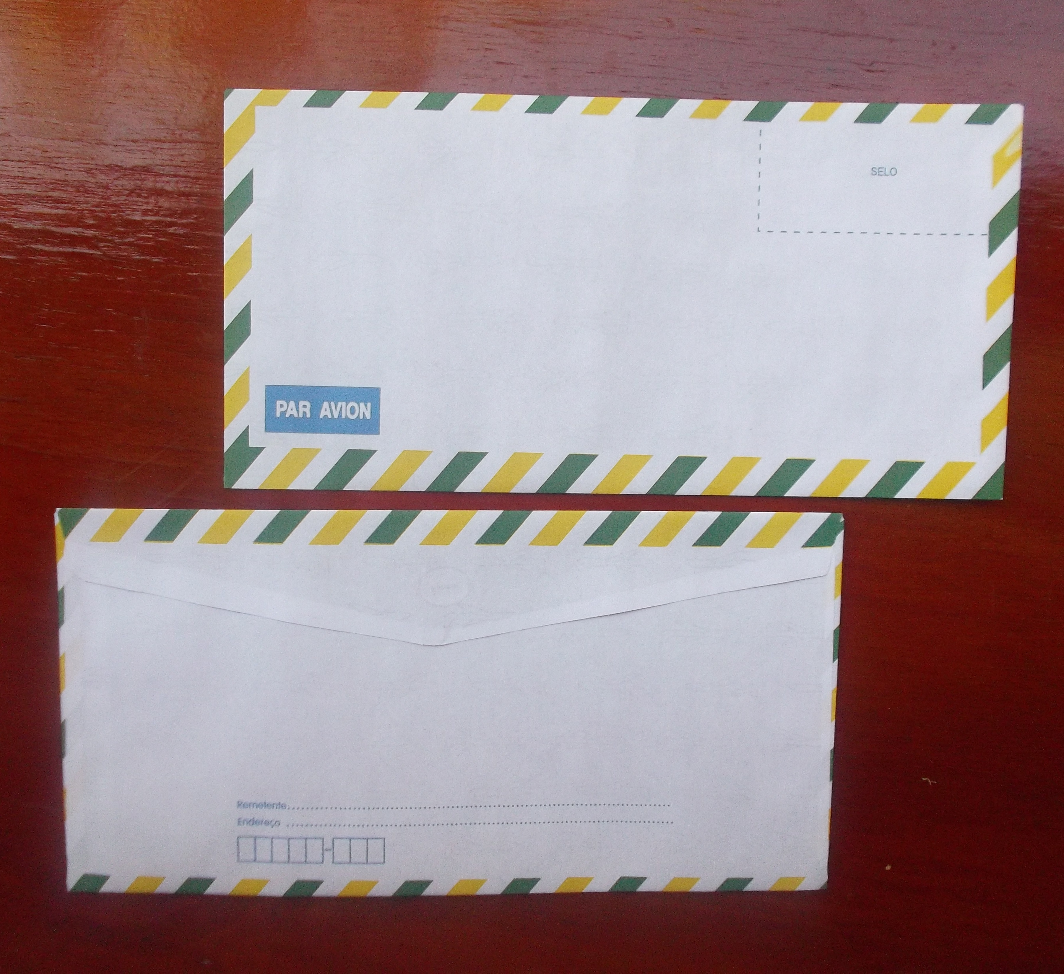 Frente e verso de envelope ornamentado com as cores da Bandeira do Brasil.